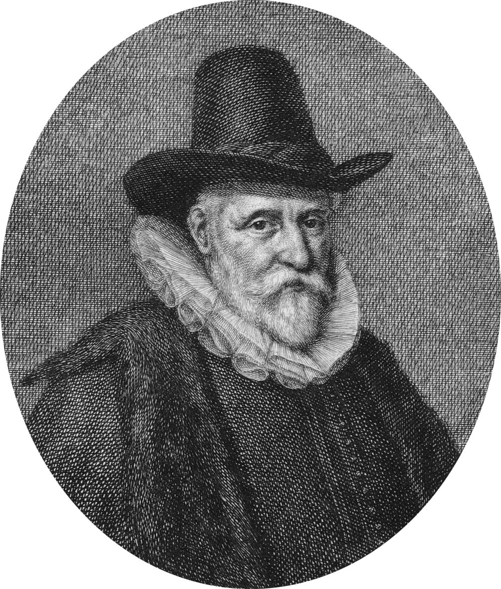 Gerrit Jacob Witsen (+24-01-1626) Korenkoper; Burgemeester van Amsterdam 1609-1625.